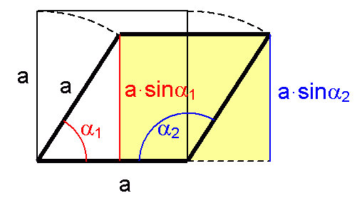 Vypocet obsahu kosoctverce pomoci vzorce S = a^2 * sin(alpha) Licensing Nakreslil jsem to ve Wordu, vyfotil printscreenem a oriznul.